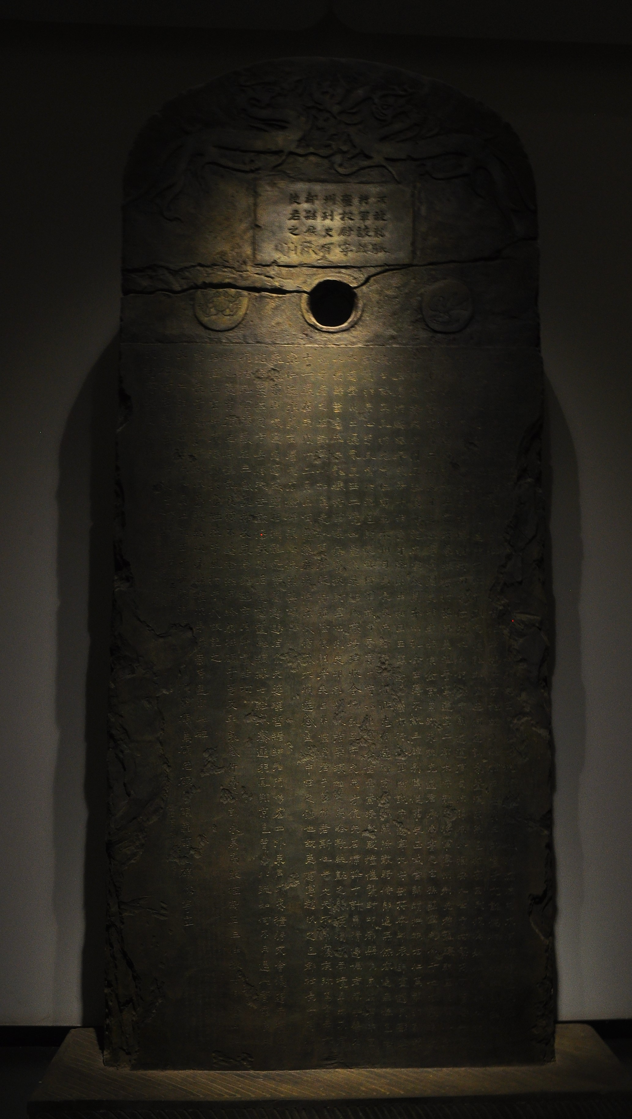 中文（中国大陆）: 云南省博物馆-南朝-陆良-爨龙颜碑复制品